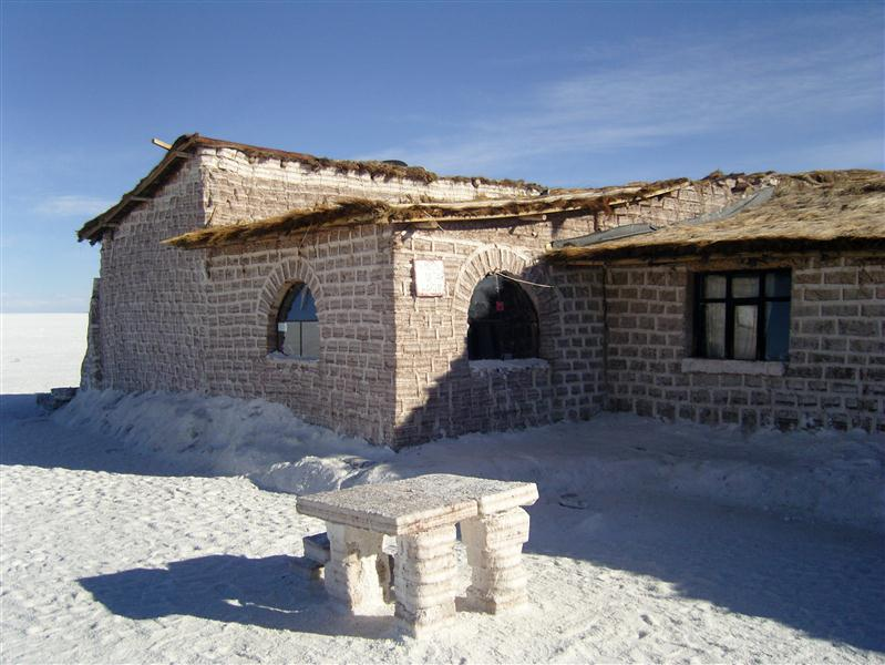 Hotel de Sal en el Salar de Uyuni, Potosí - Bolivia